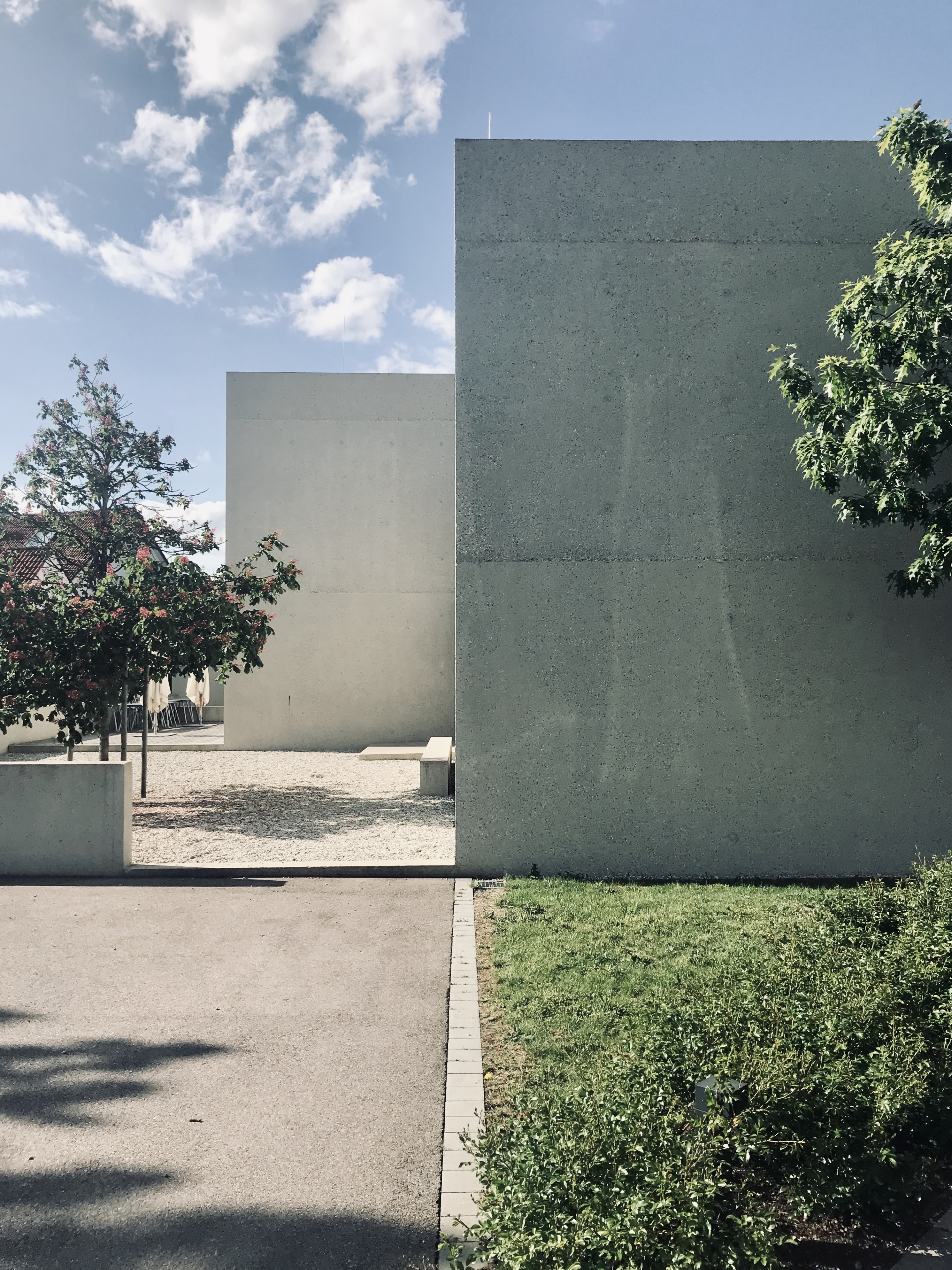 Kranzberg